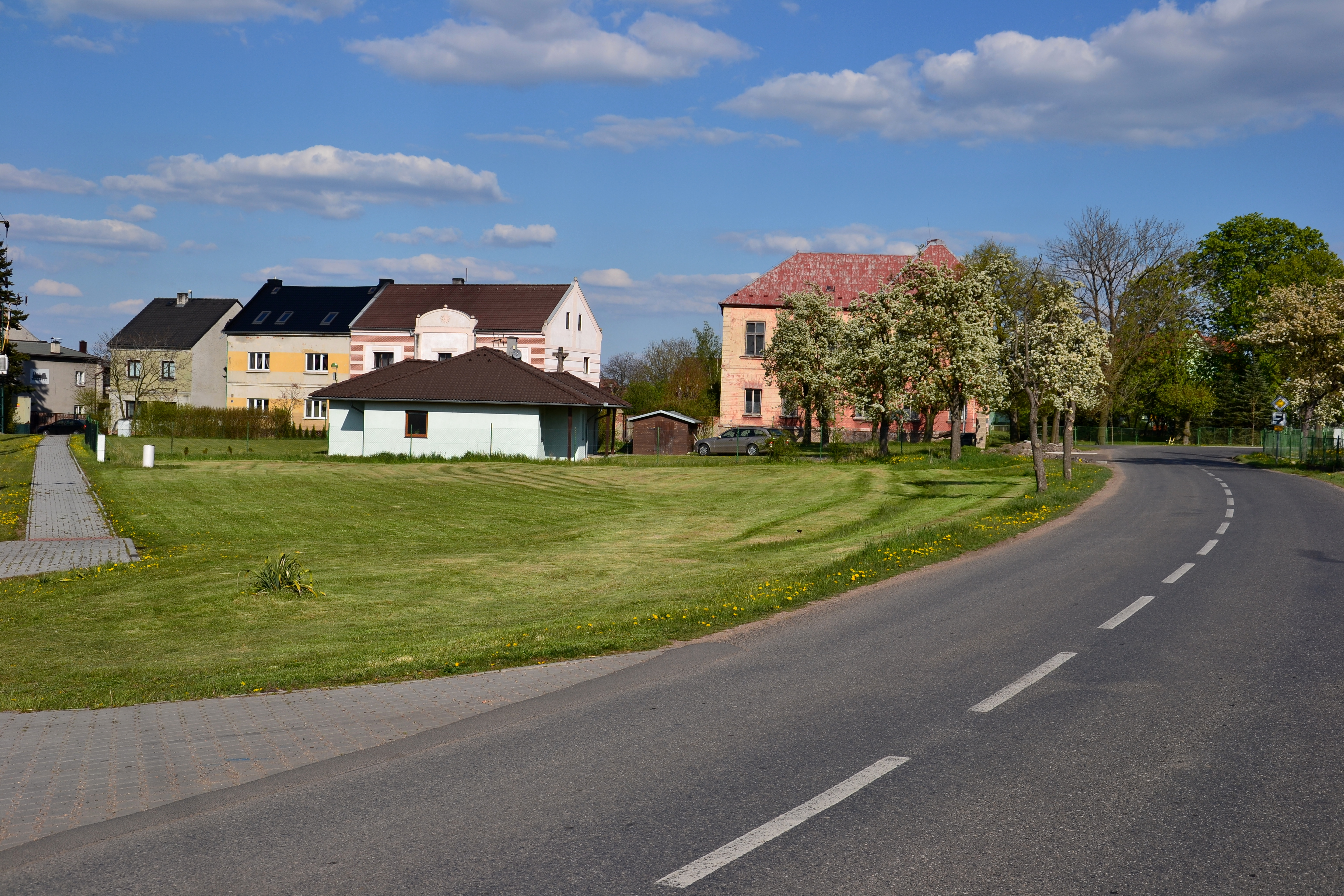 Vrskmaň – okrajová část vesnice u vjezdu od Jirkova a Zaječic